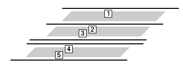 奈良駅ホーム配置図